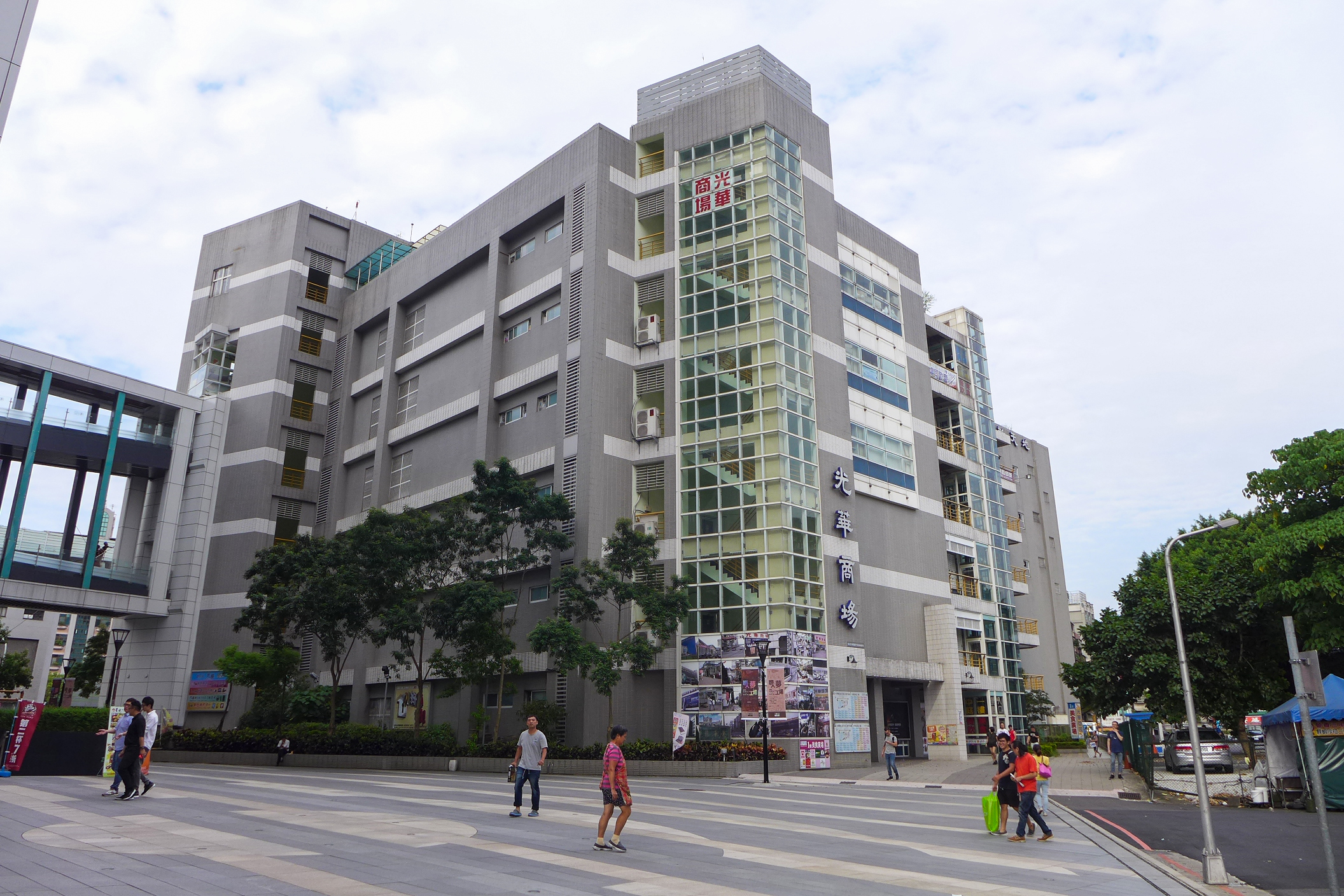 Guang Hua Digital Plaza